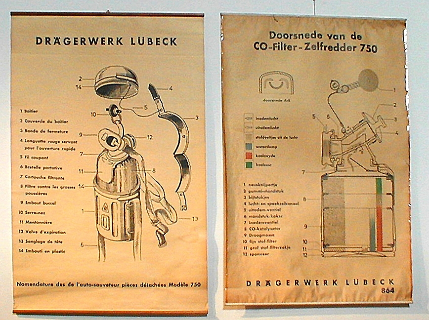 Manuel d'utilisation d'un appareil respiratoire Dragër